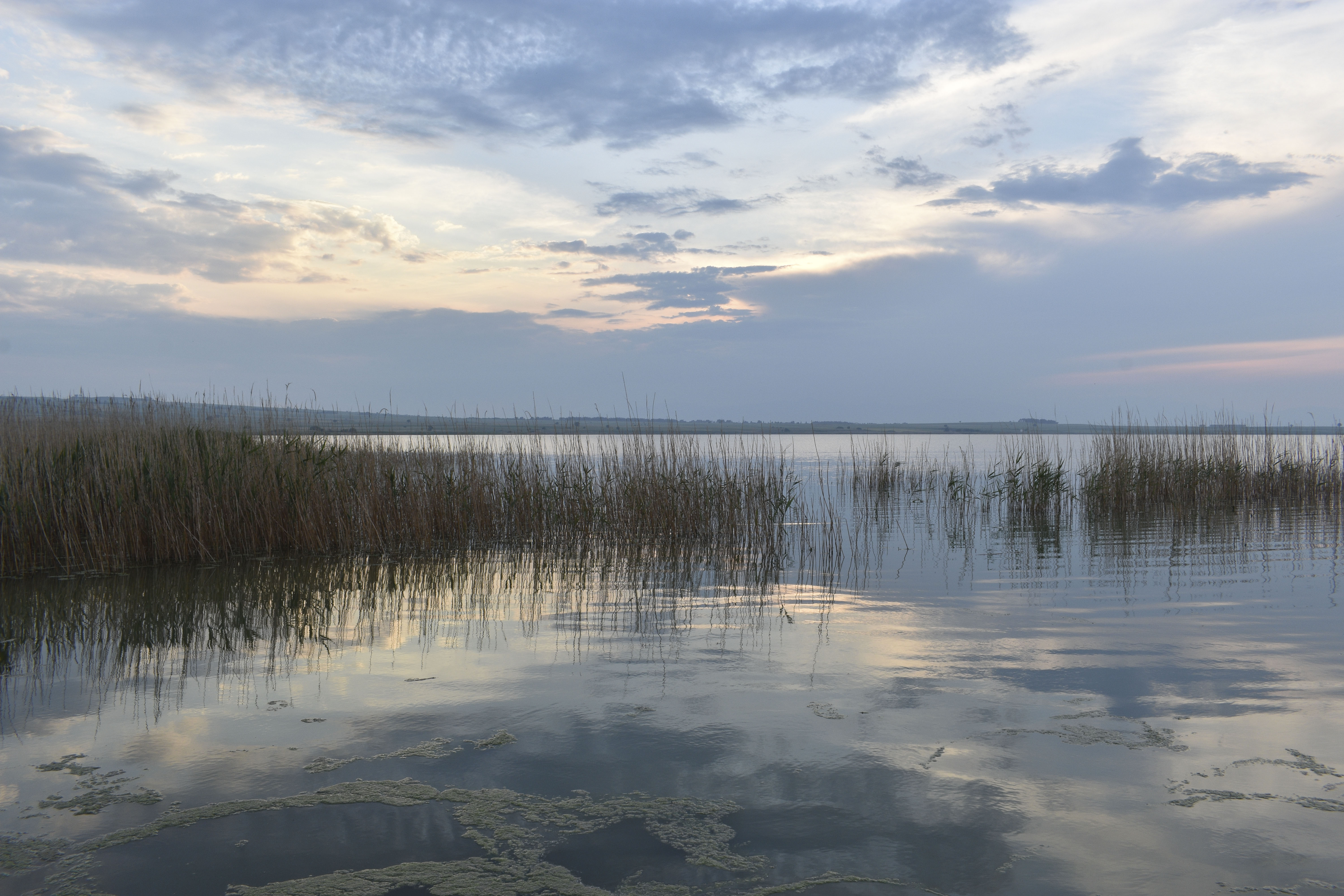 LIMNI PIKROLIMNI - XILOKERATEA This is a photography of Natura 2000 protected area with ID GR1230004